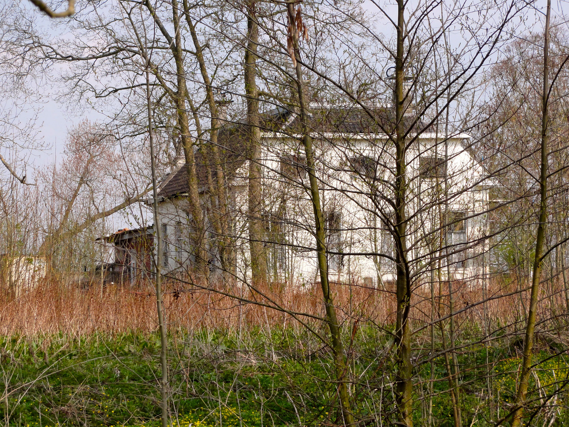 Boerderij Omtadaburgh aan de Omtadaweg 8 nabij 't Zandt